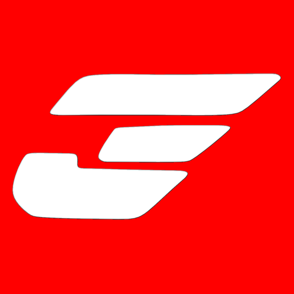 Banner der Charakterfigur Jett aus der Zeichentrickserie Super Wings.